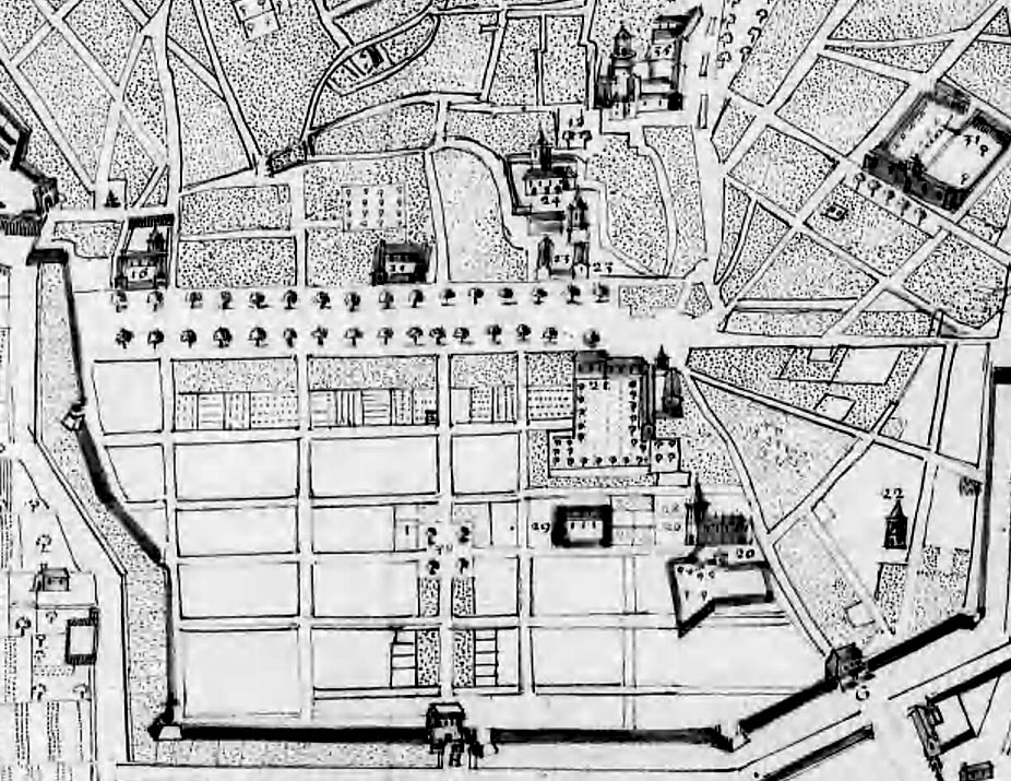 Plan de la ville d'Aix (détail) 1666